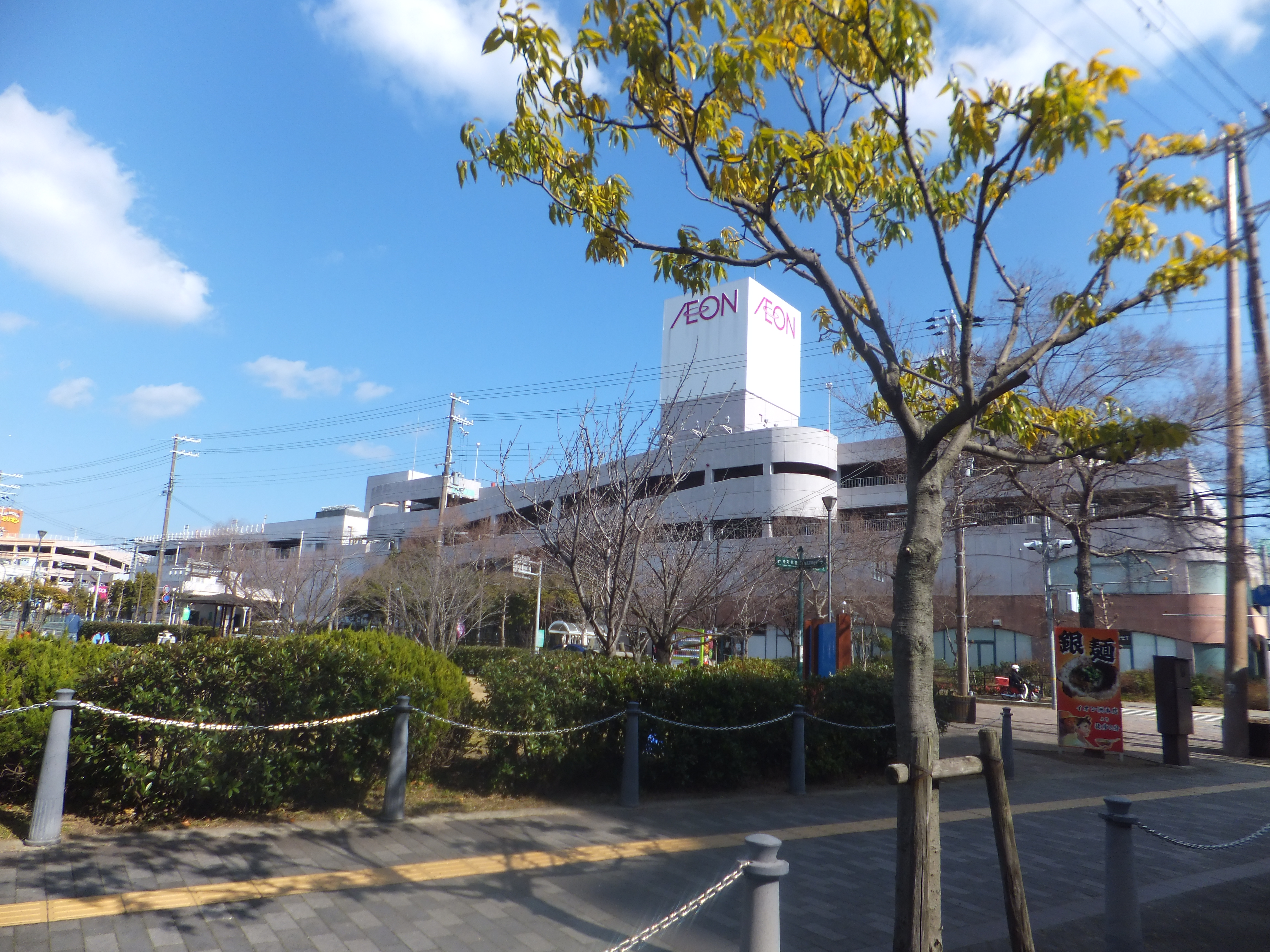 イオン洲本ショッピングセンター